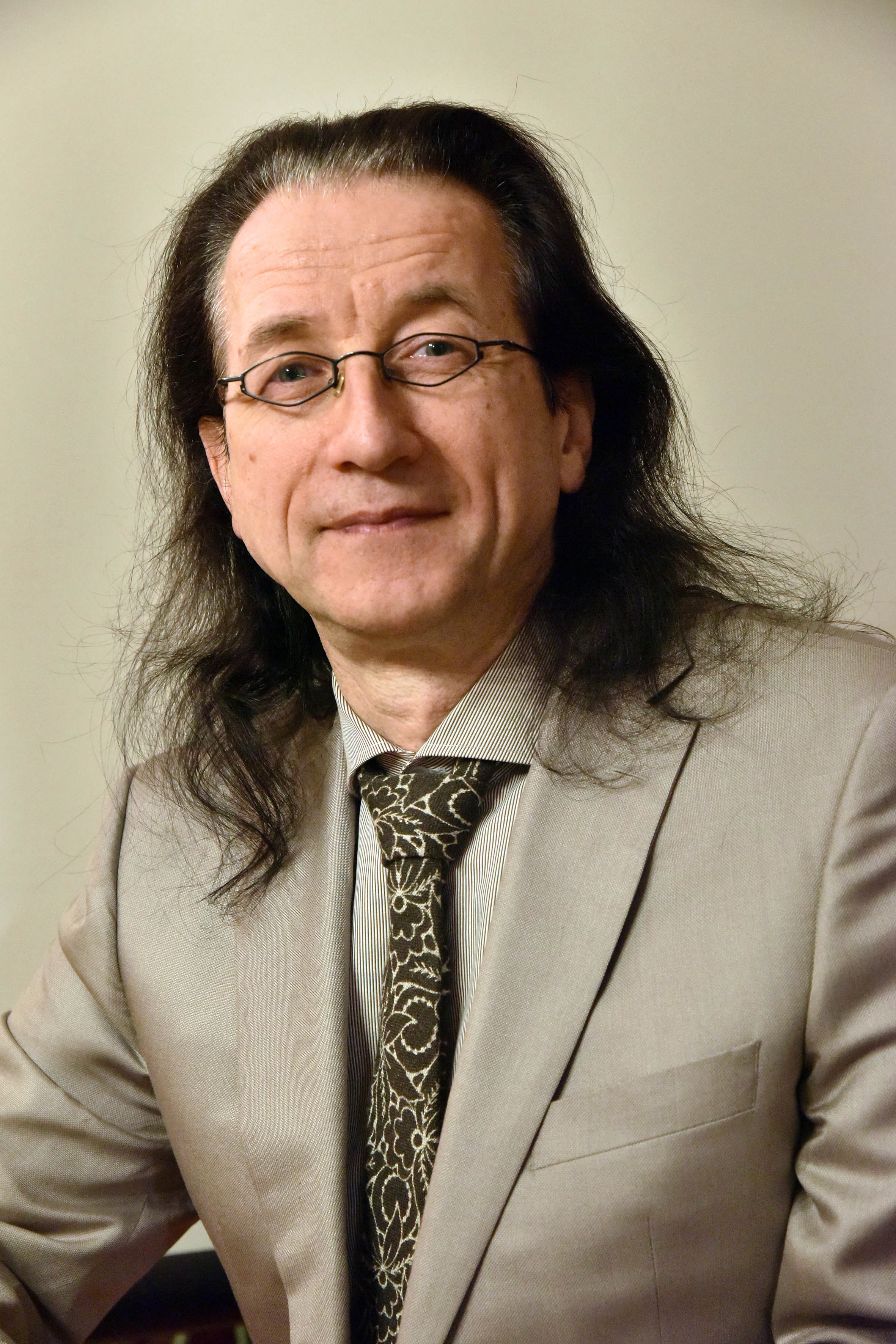 Josef Gülpers, Foto Andreas Herrmann